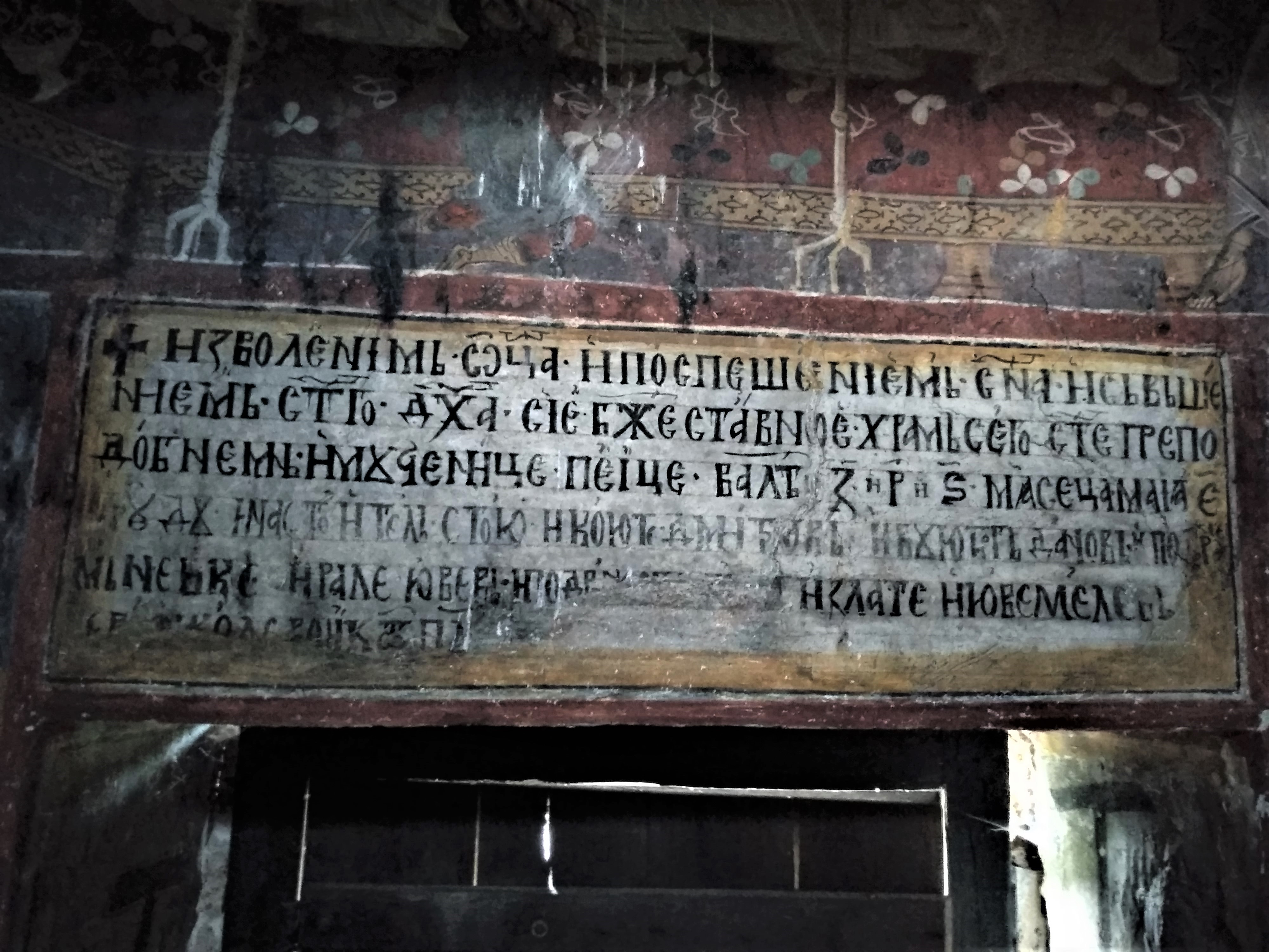 "Света Петка" (с. Вуково), Ктиторски надпис